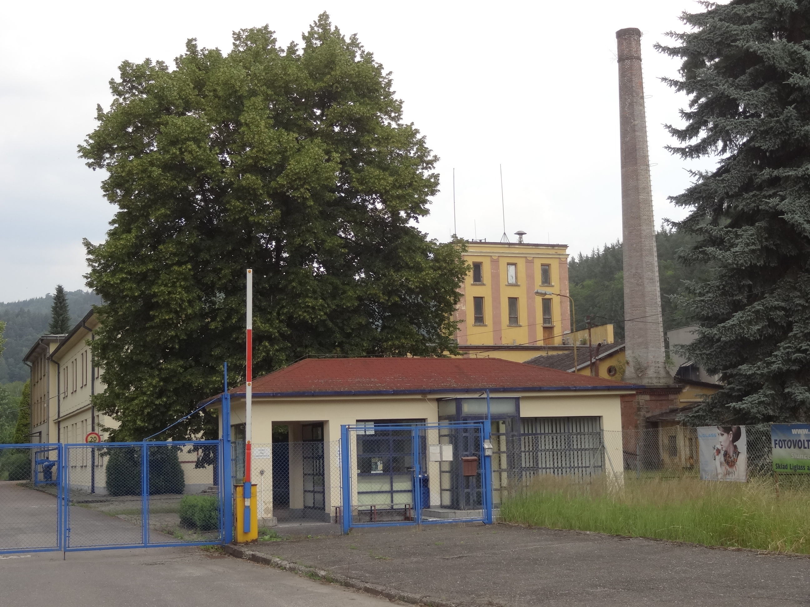 Líšný 2.díl - továrna čp. 6